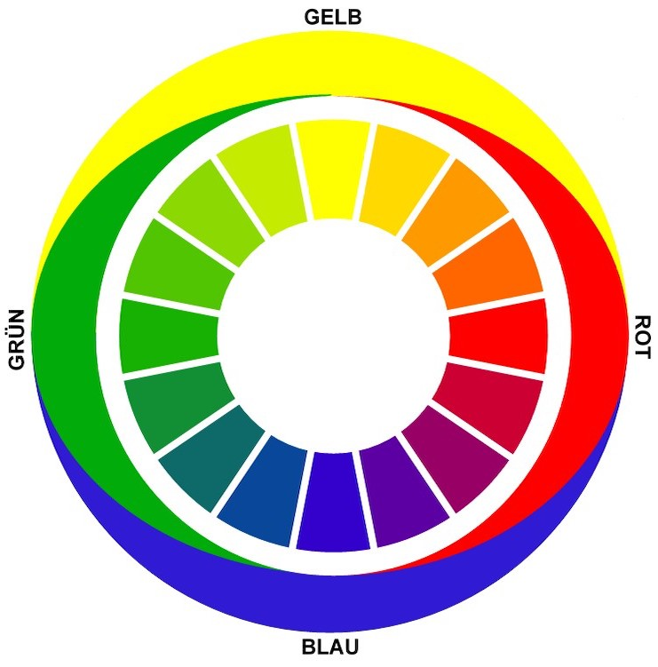 Farbkreis nach Ewald Hering